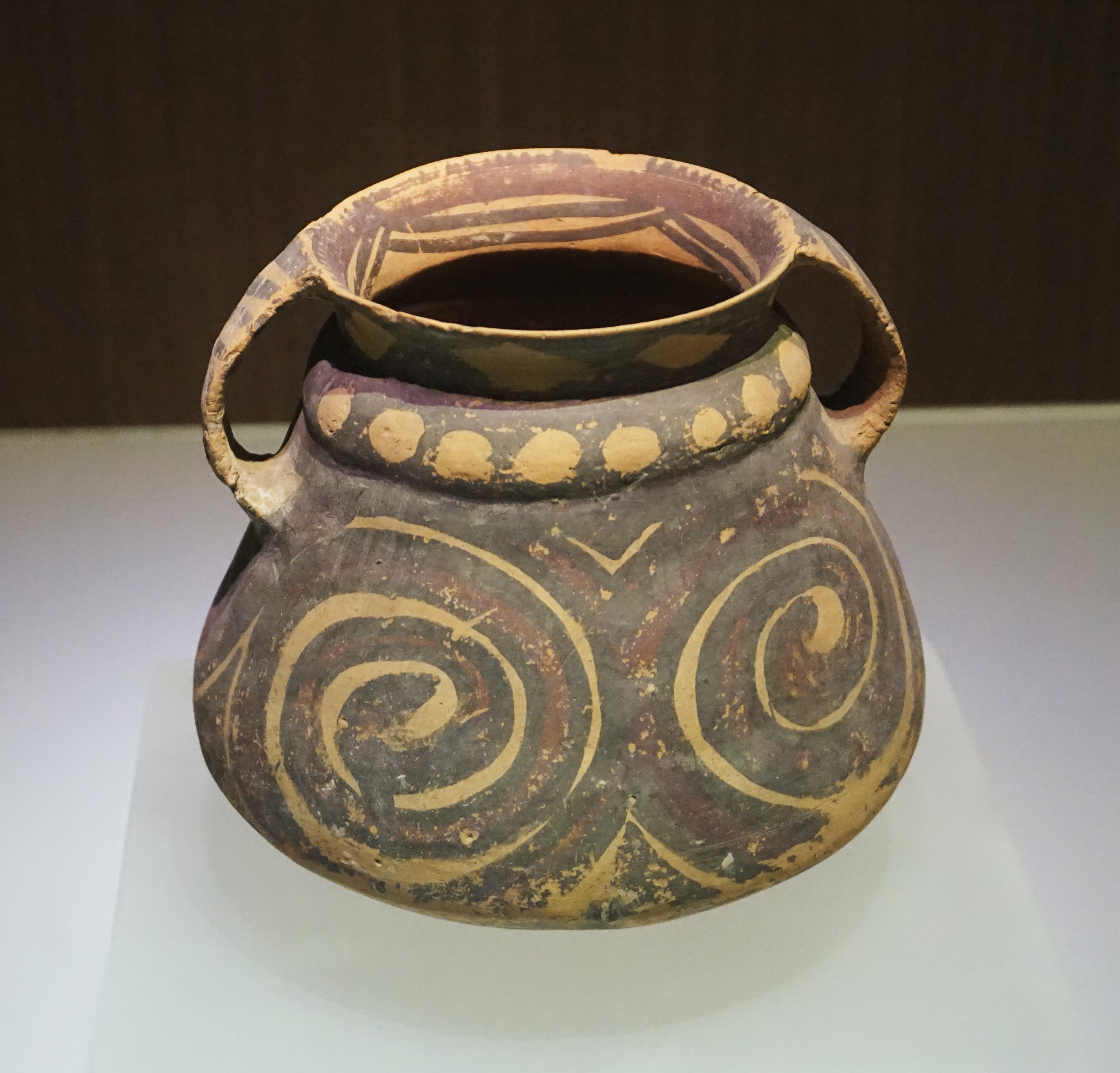 螺纹双耳罐，马家窑文化马厂类型。